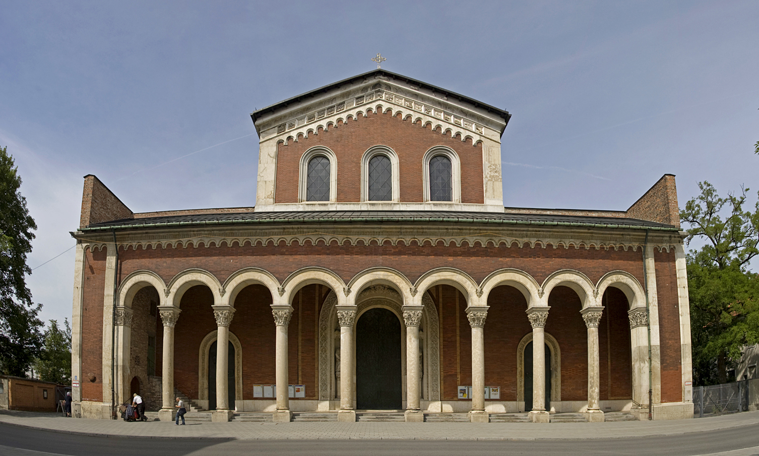 Kirche St. Bonifaz - Maxvorstadt - Karlstraße